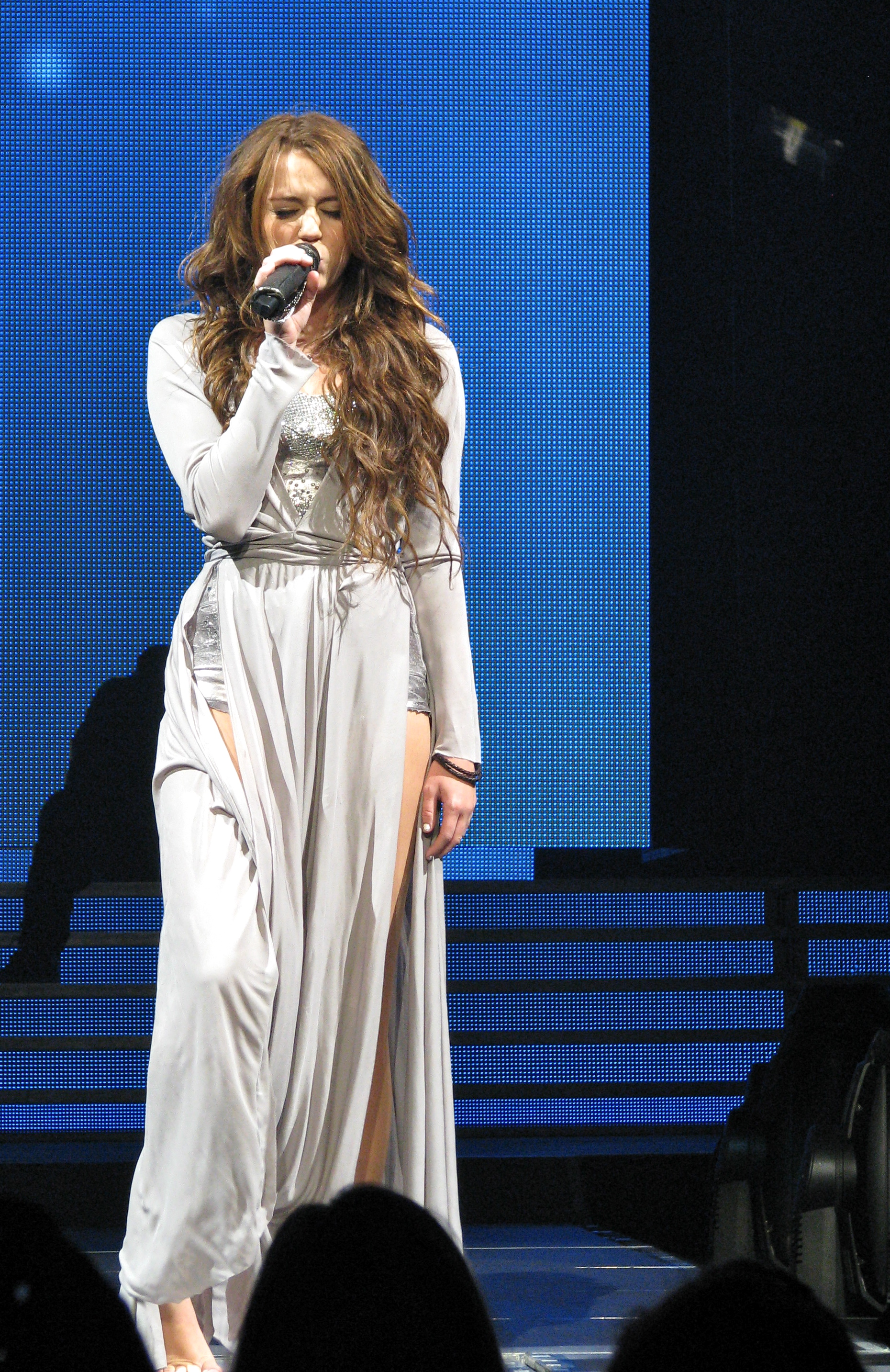 A teen singing.